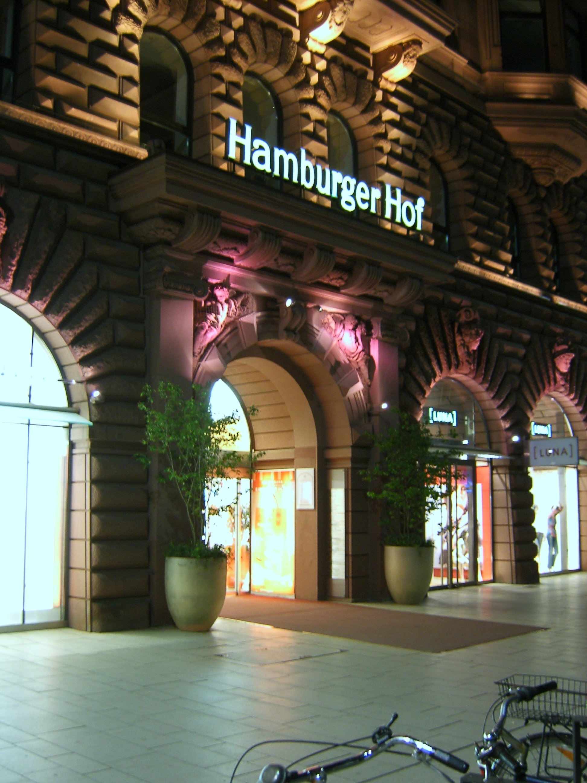 Der Hamburger Hof am Jungfernstieg in der Hamburger Neustadt wurde 1881 bis 1883 nach Plänen von Hanssen & Meerwein als Luxushotel erbaut. 1976 bis 1979 wurde das Gebäude zur Ladenpassage umgebaut. Die Plastiken stammen von Engelbert Peiffer.